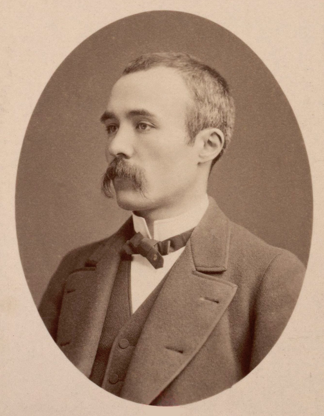 Georges Clemenceau photographié par Nadar.